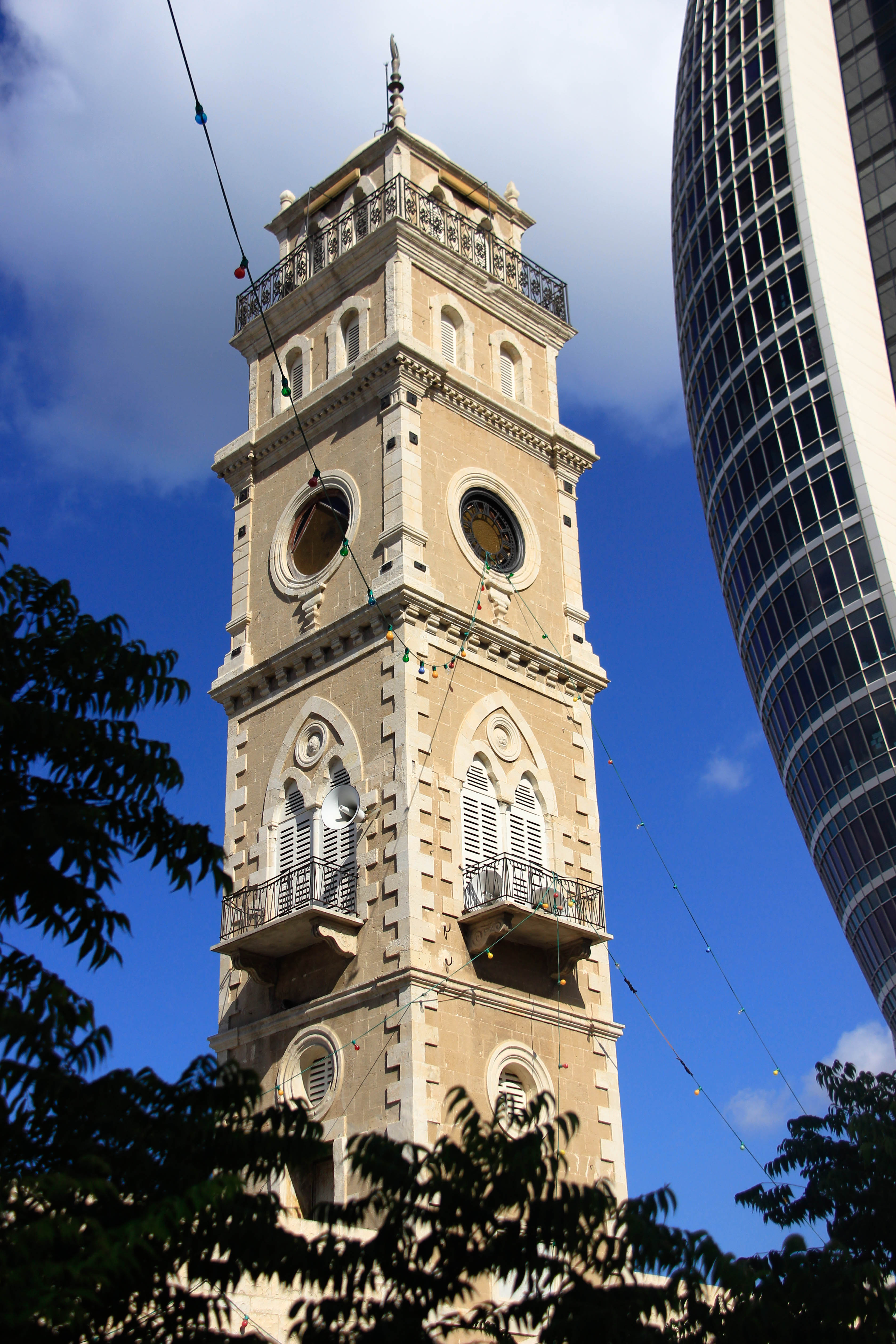 مسجد الجرينة، حيفا. تصوير: معتز توفيق اغبارية.